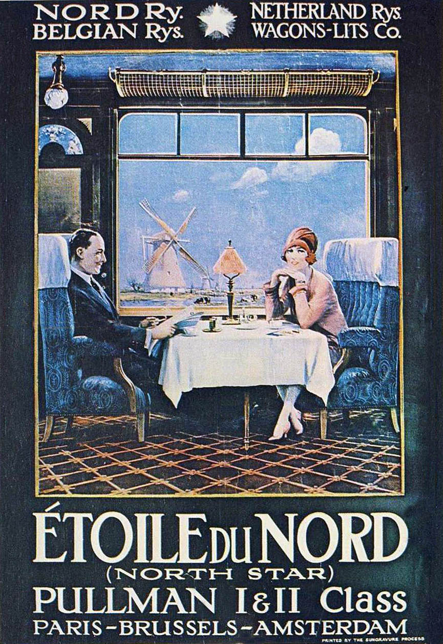 Affiche du train Étoile du Nord (North Star).